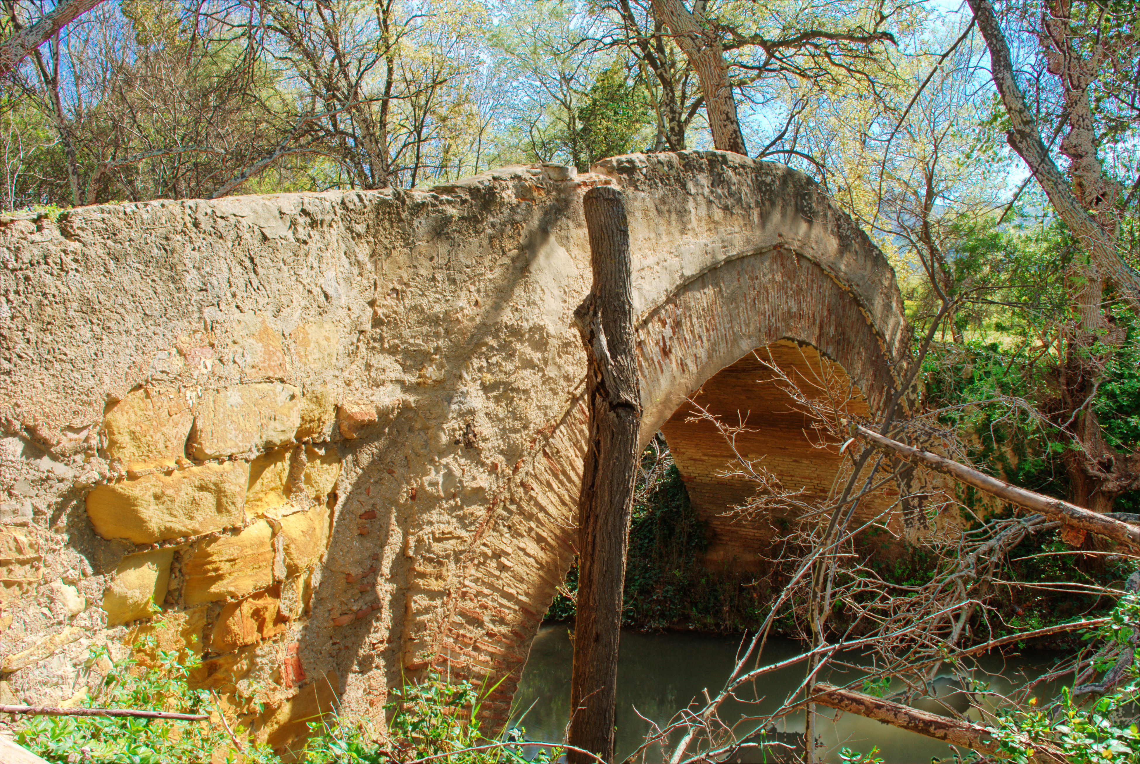 Puente nazarí de Ortegícar, Cañete la Real, Málaga, España.